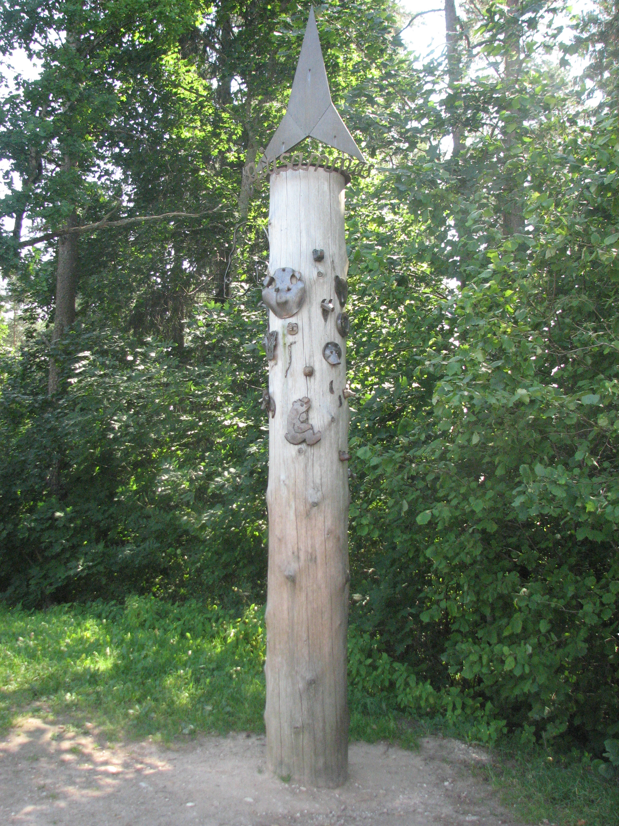 Column of energy in Otepää, Estonia.